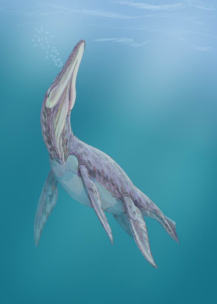 Megalneusaurus